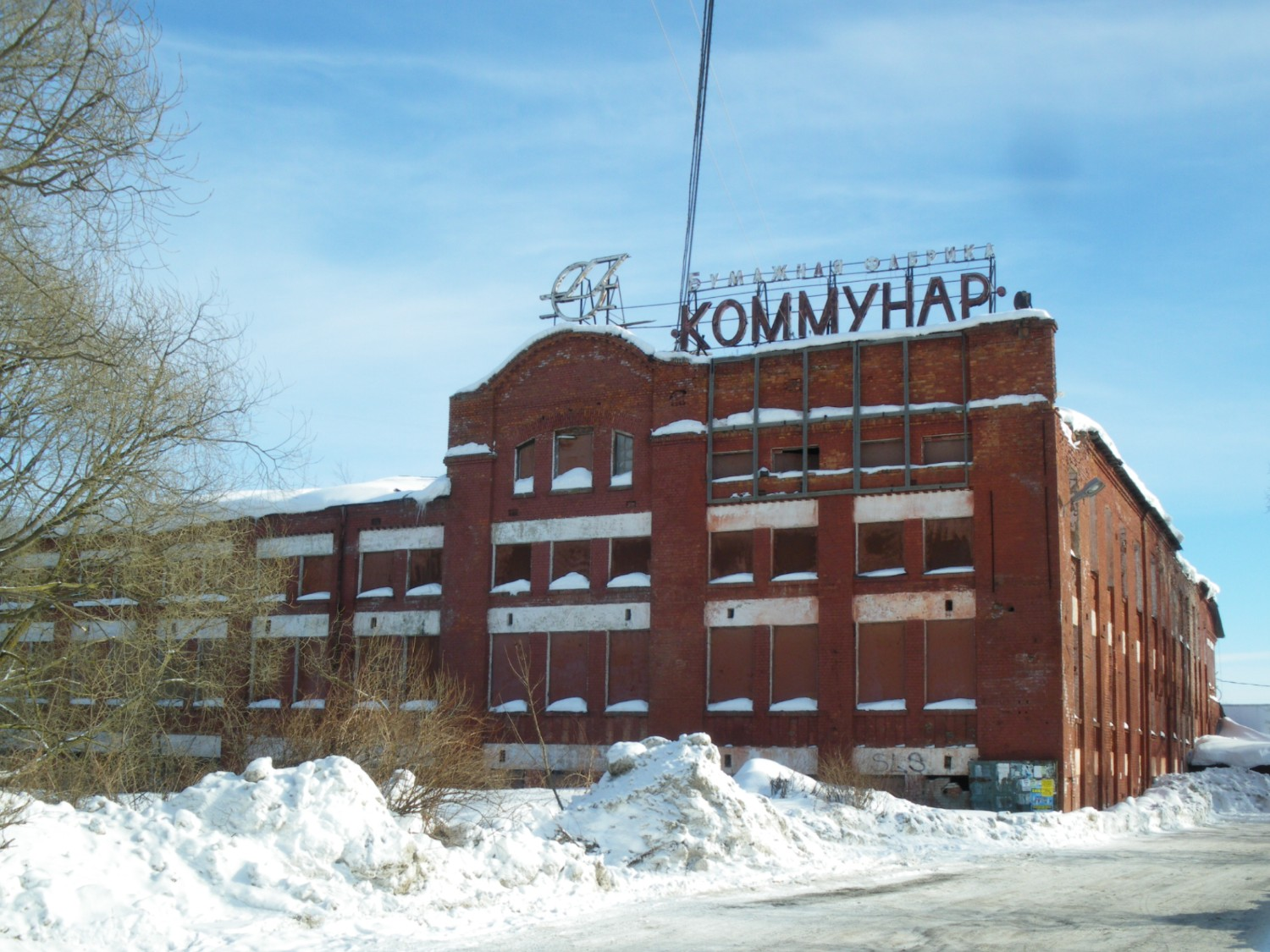 Россия, Ленинградская область, Гатчинский район, город Коммунар, фабрика «Коммунар». Дата съёмки - 6 марта 2010 г. Автор - Роговиков Николай.